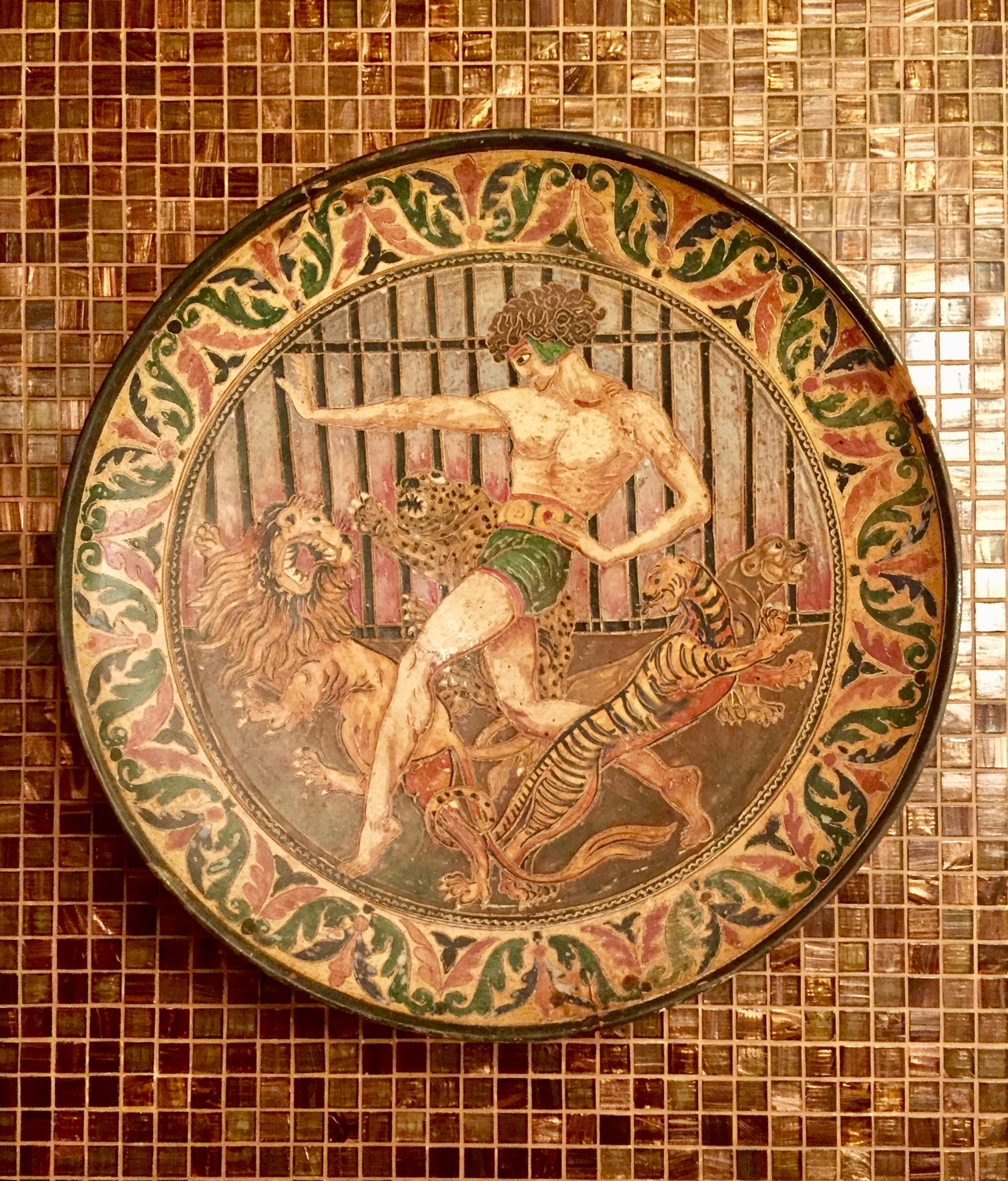 “Danza", Dante Milani, Montopoli in Val D'Arno. Grande piatto in terracotta, da una xilografia del 1924 di Francesco Nonni. Diam. 55 cm. Esemplare unico del 1932. Tecnica: ingobbiato e graffito a punta sotto vetrina piombifera, con patina invecchiante e inceratura. Bibliografia: il piatto è raffigurato sul catalogo originale della Manifattura Milani del 1932, al numero 47, con dimensioni e prezzo (L.65).